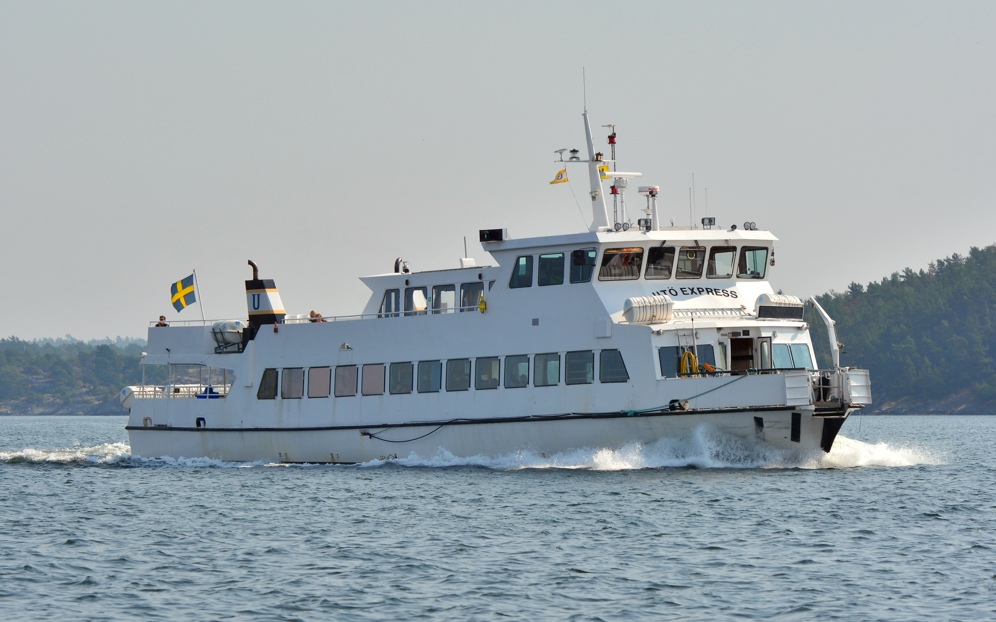 Utö Rederis fartyg M/S Utö Express.